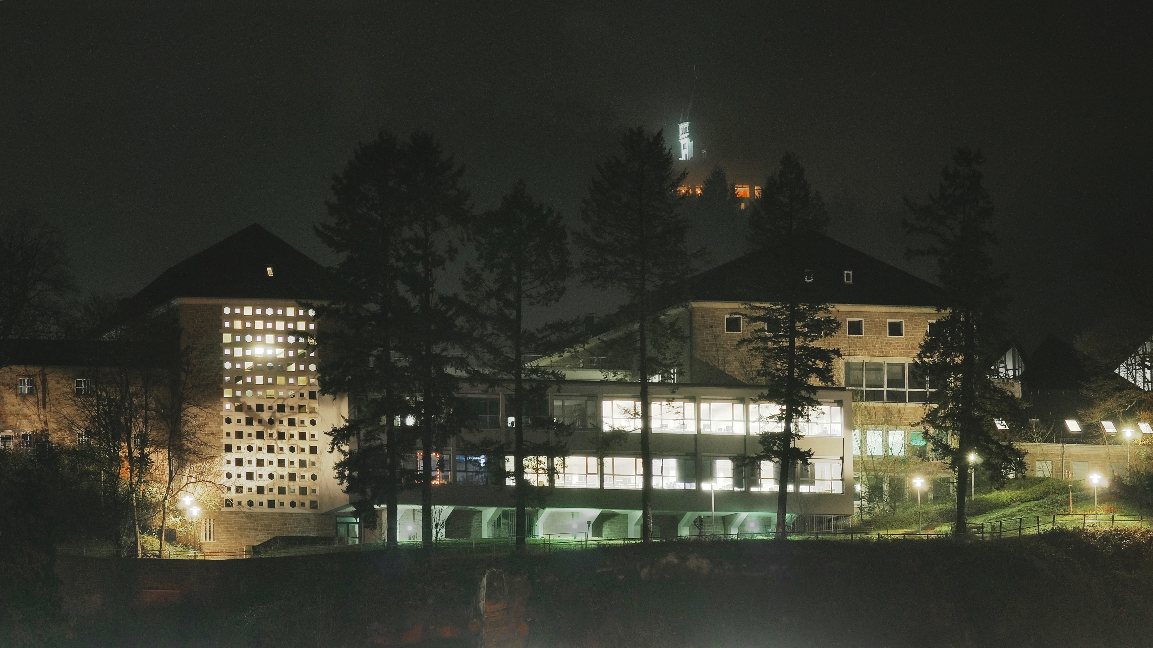 Hochschule Trier von Osten (über die Mosel fotografiert). Ganz oben das Hotel Kockelsberg